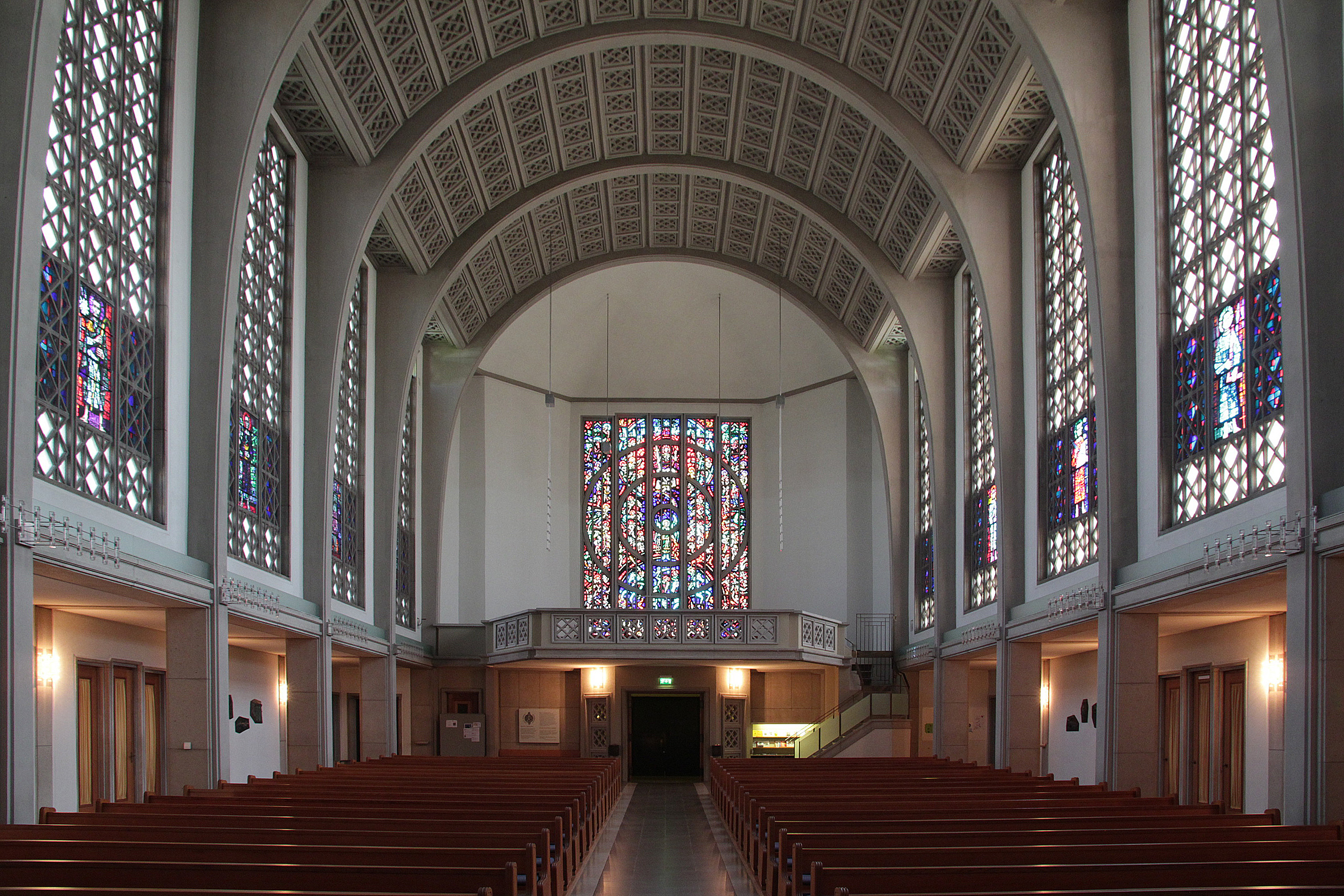 römisch-katholische Kirche Maria Frieden, Dübendorf; Kirchenschiff und Empore, vor Einbau der Hauptorgel durch Bernhard Edskes